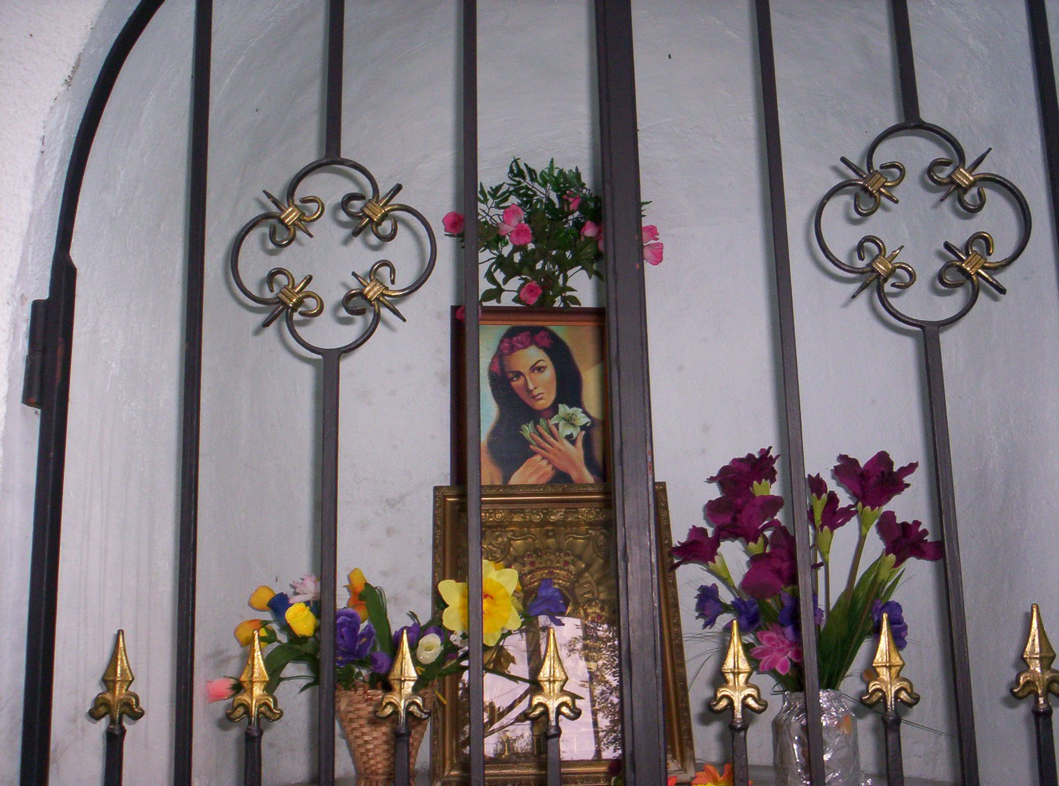 Kapliczka św. Rozalii